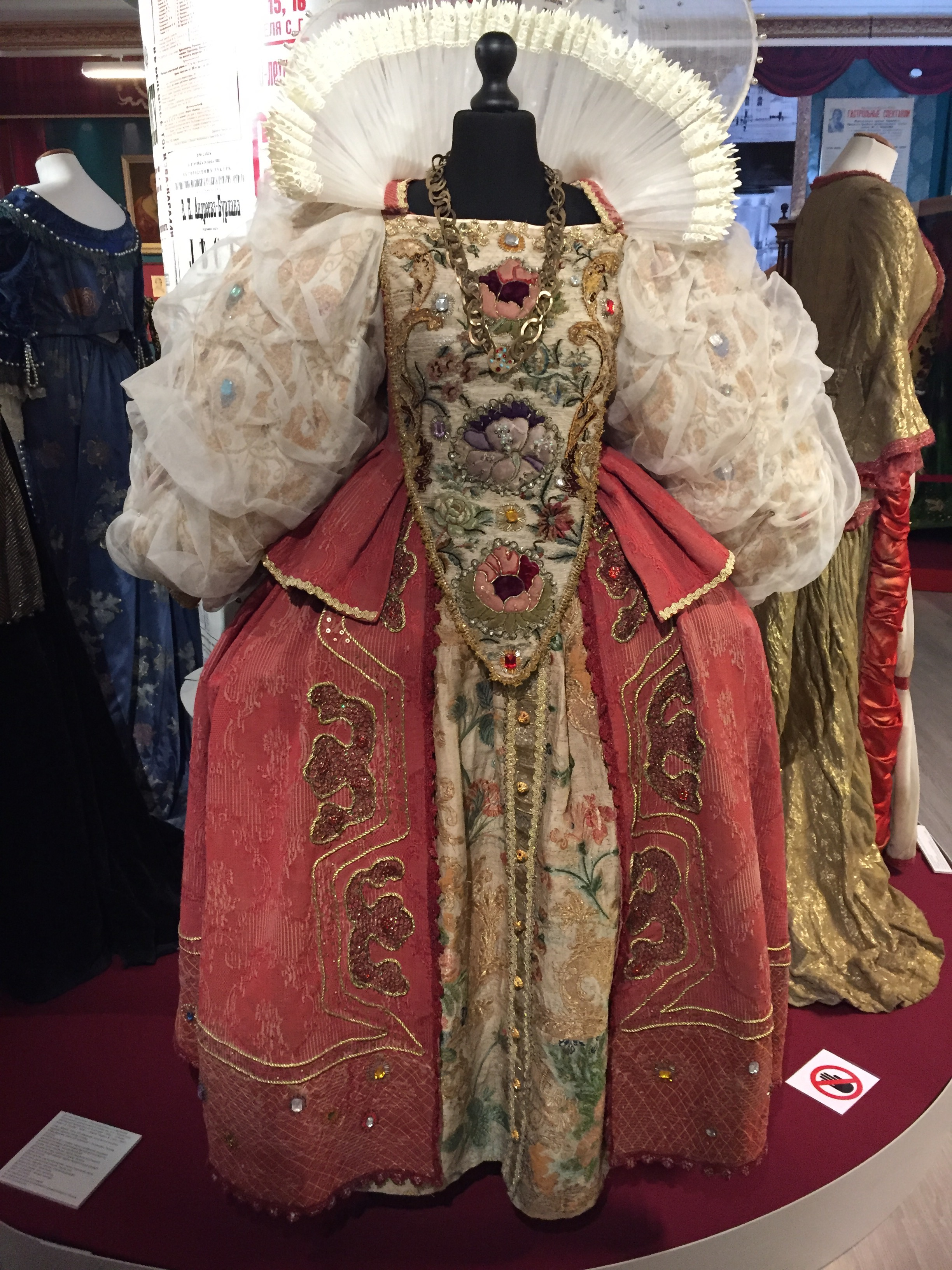 Из экспозиции музеев Кремля